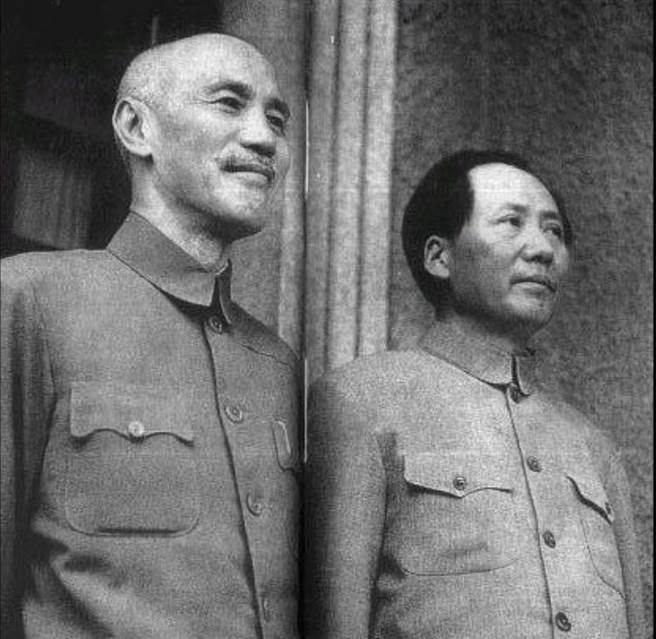 重慶會談 蔣介石與毛澤東合影